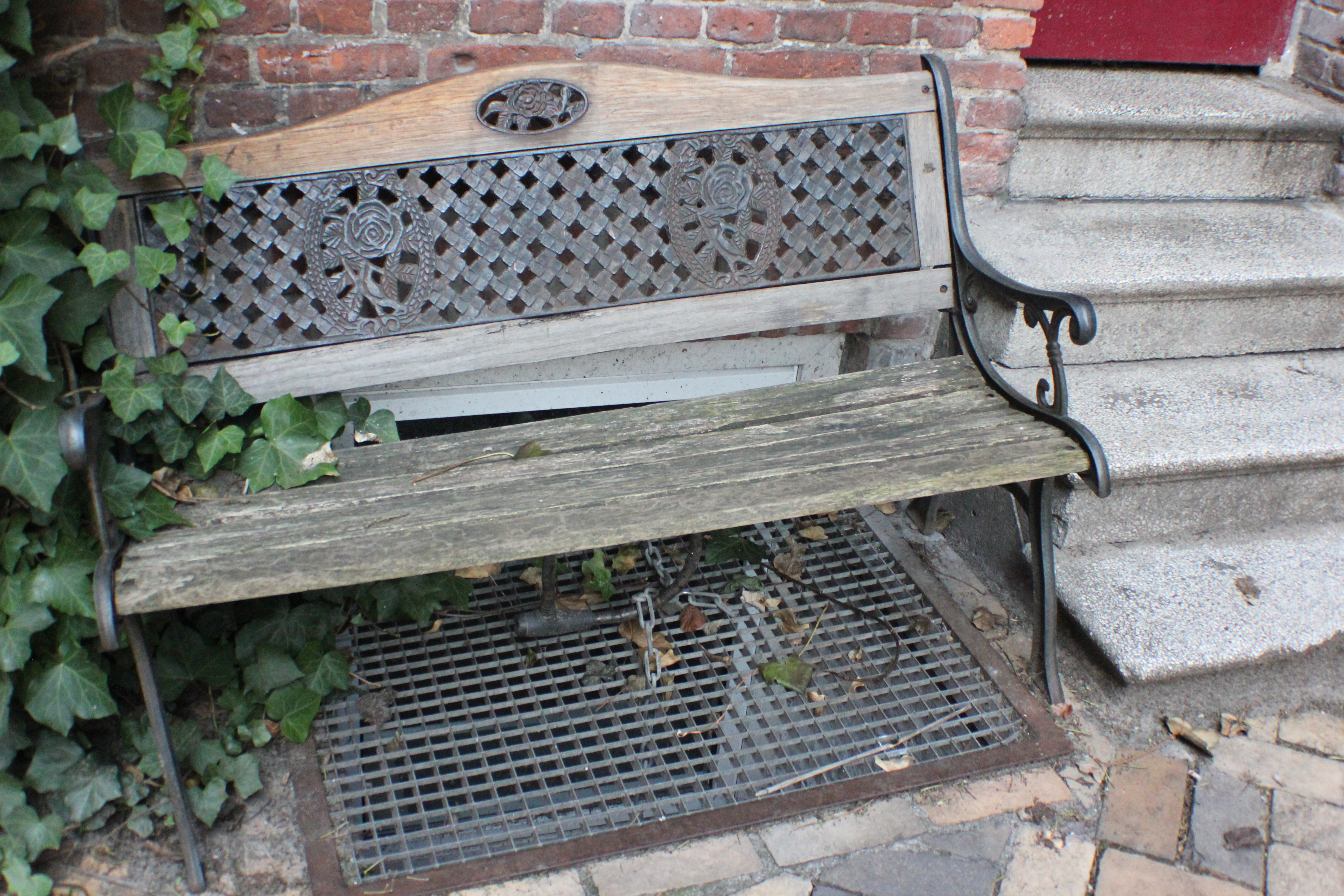 Burghof, Flensburg, Bank unter der Gedenktafel, Bild 01